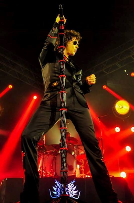 Bunbury en Córdoba, Argentina, el 31 de marzo de 2016